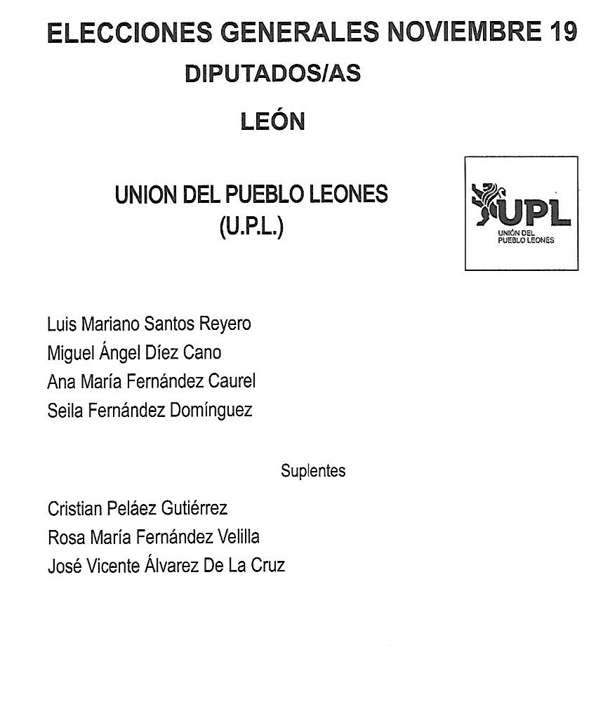 Papeleta electoral de Unión del Pueblo Leonés (UPL) para el Congreso - Elecciones Generales de España de noviembre de 2019, circunscripción de León.